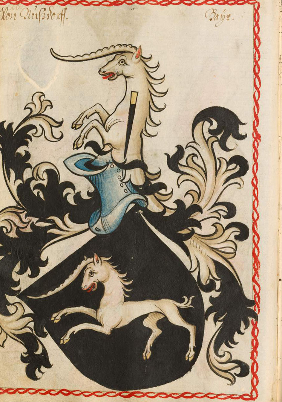 Scheiblersches Wappenbuch, älterer Teil; Seite 20 von Nußdorff Bayern